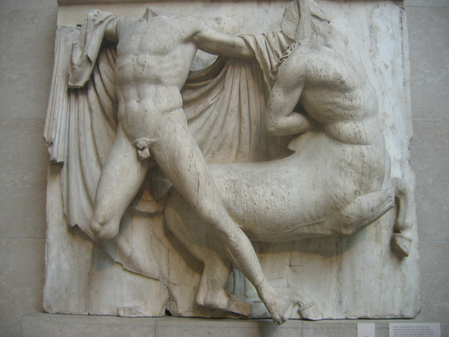 Elgin Marbles, British Museum, London : Métope sud, XXVII, centaure